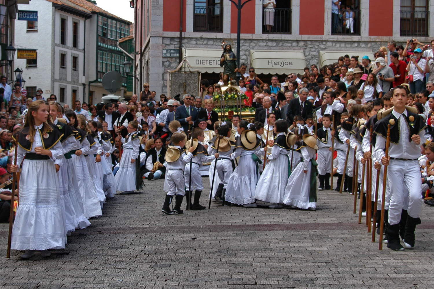 La fiesta de San Roque en Llanes tiene una gran tradición